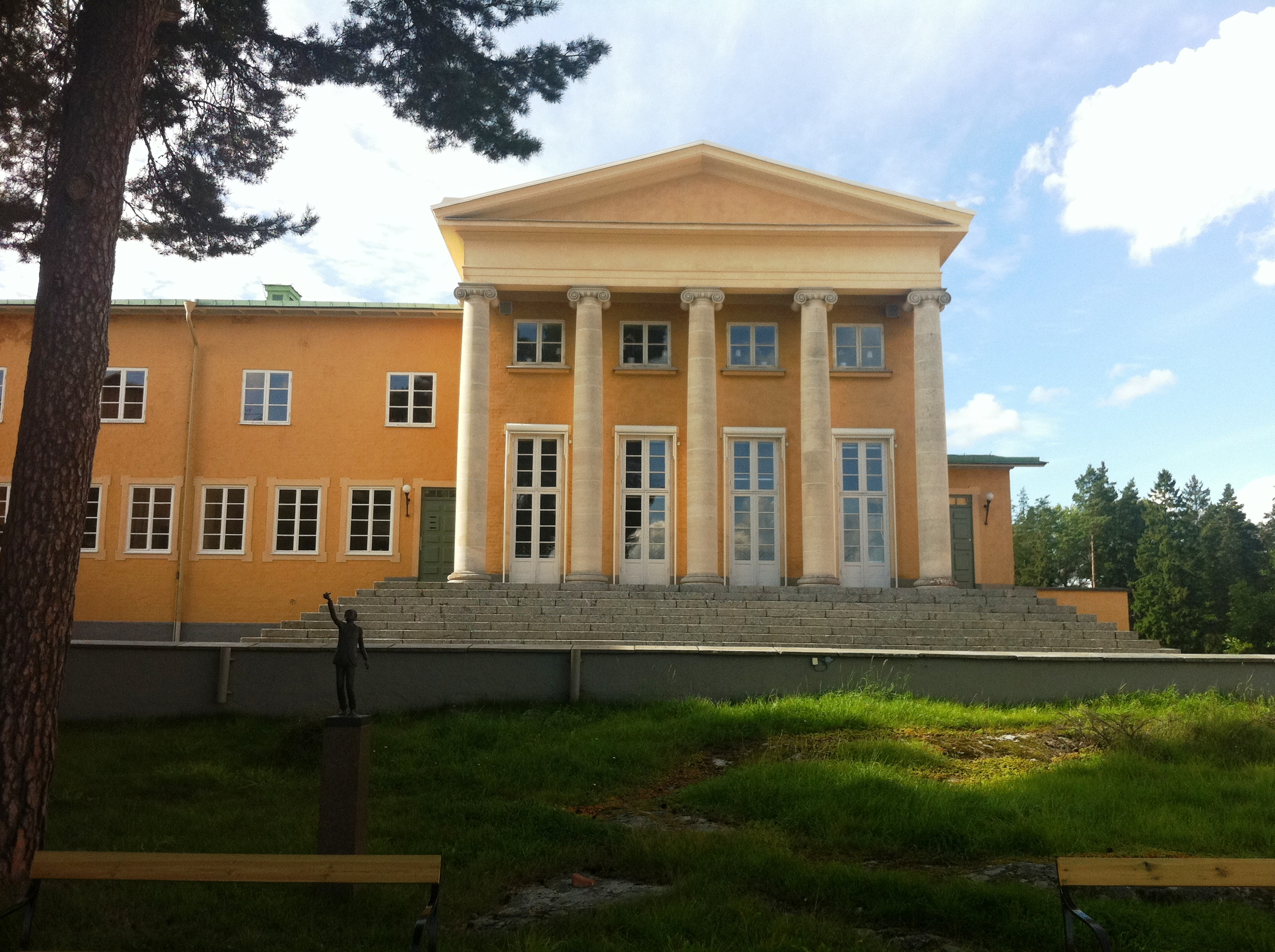 Sigtunaskolan Humanistiska Läroverket. Byggår 1927-29. Arkitekt John Åkerlund